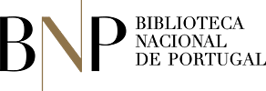 logotipo da Biblioteca Nacional de Portugal